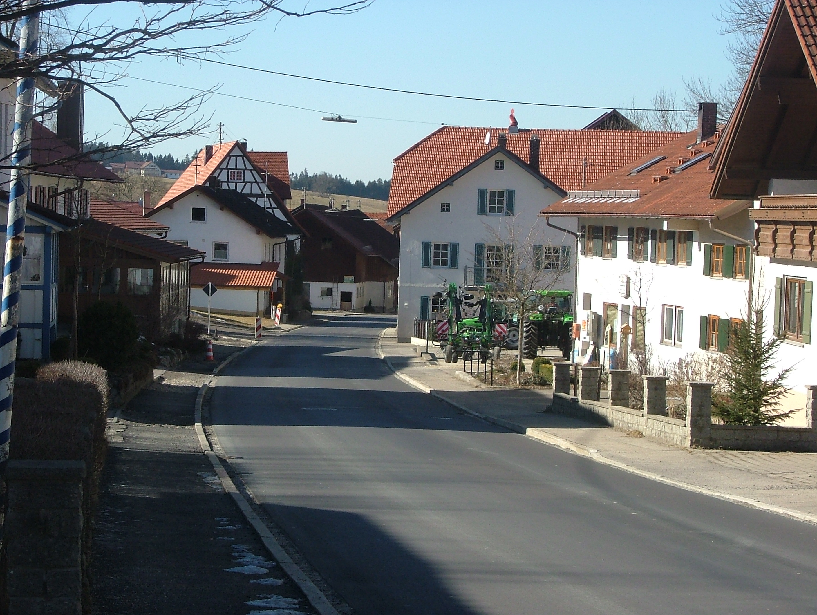 Untrasried